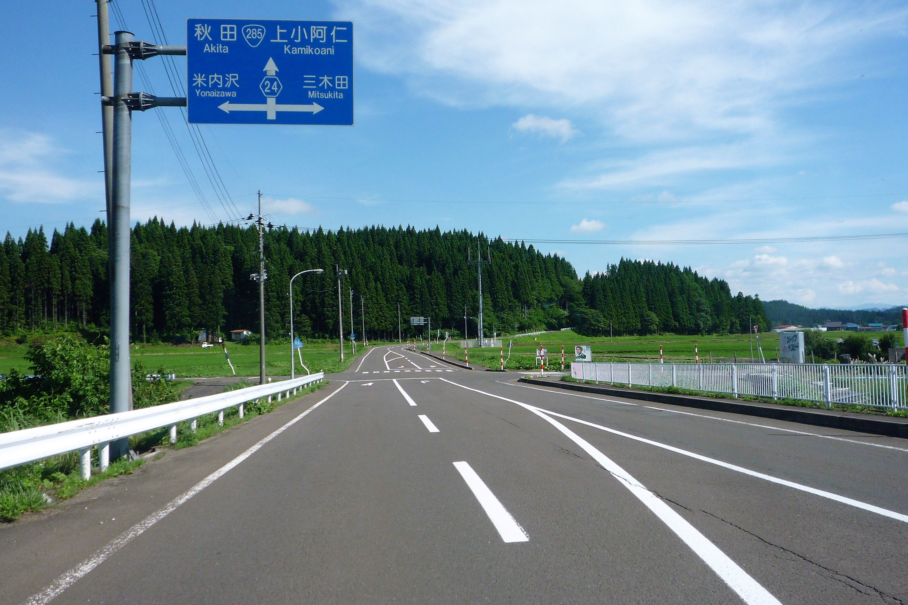 秋田県道24号鷹巣川井堂川線 芹沢バイパス